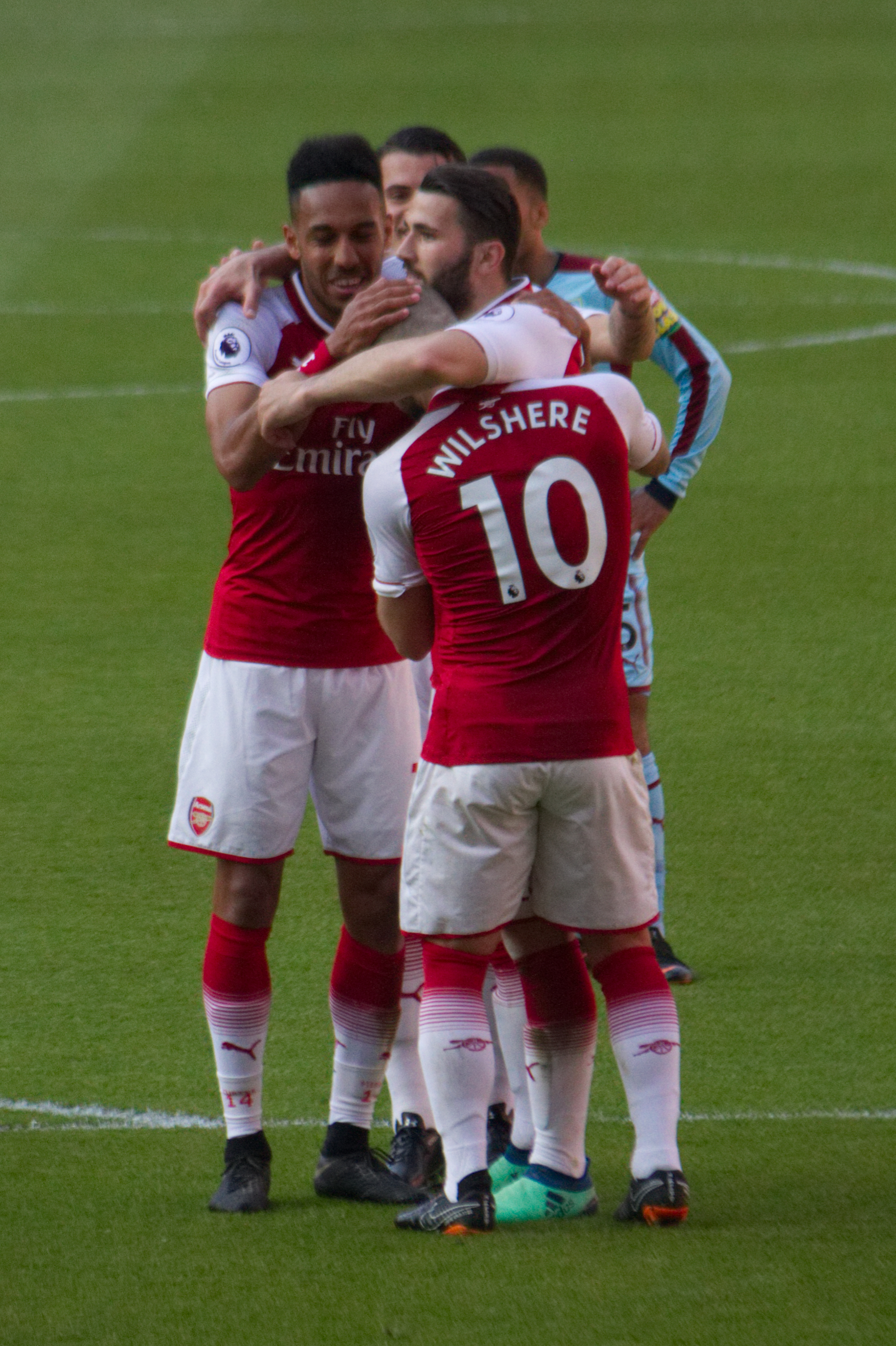 15 Merci Arsène - Celebrating Kolasinac's goal